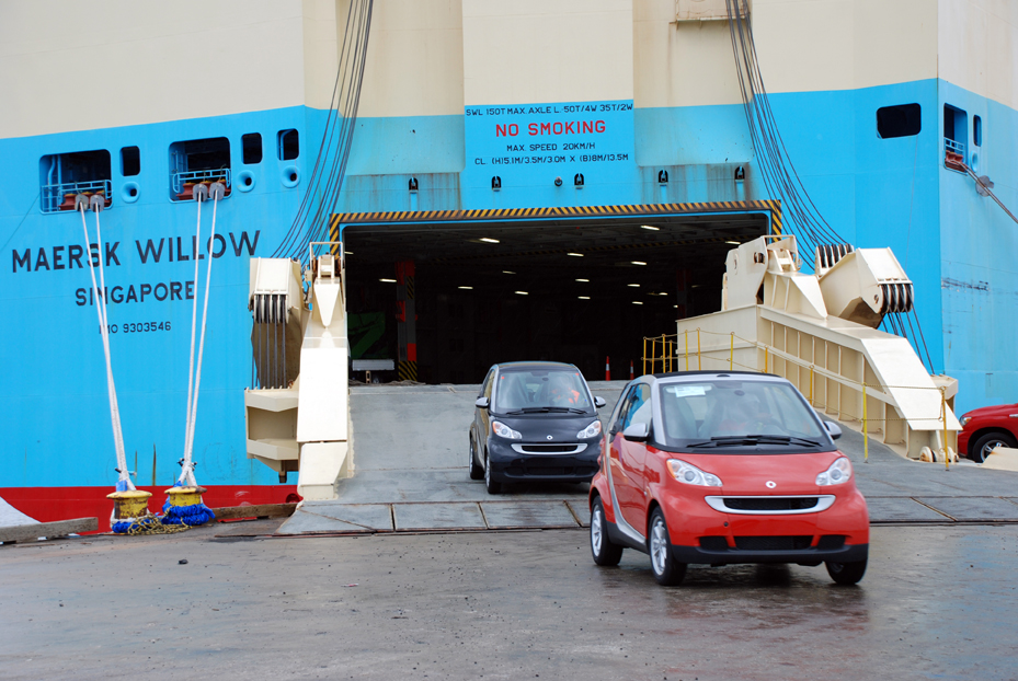 RoRo Cargo